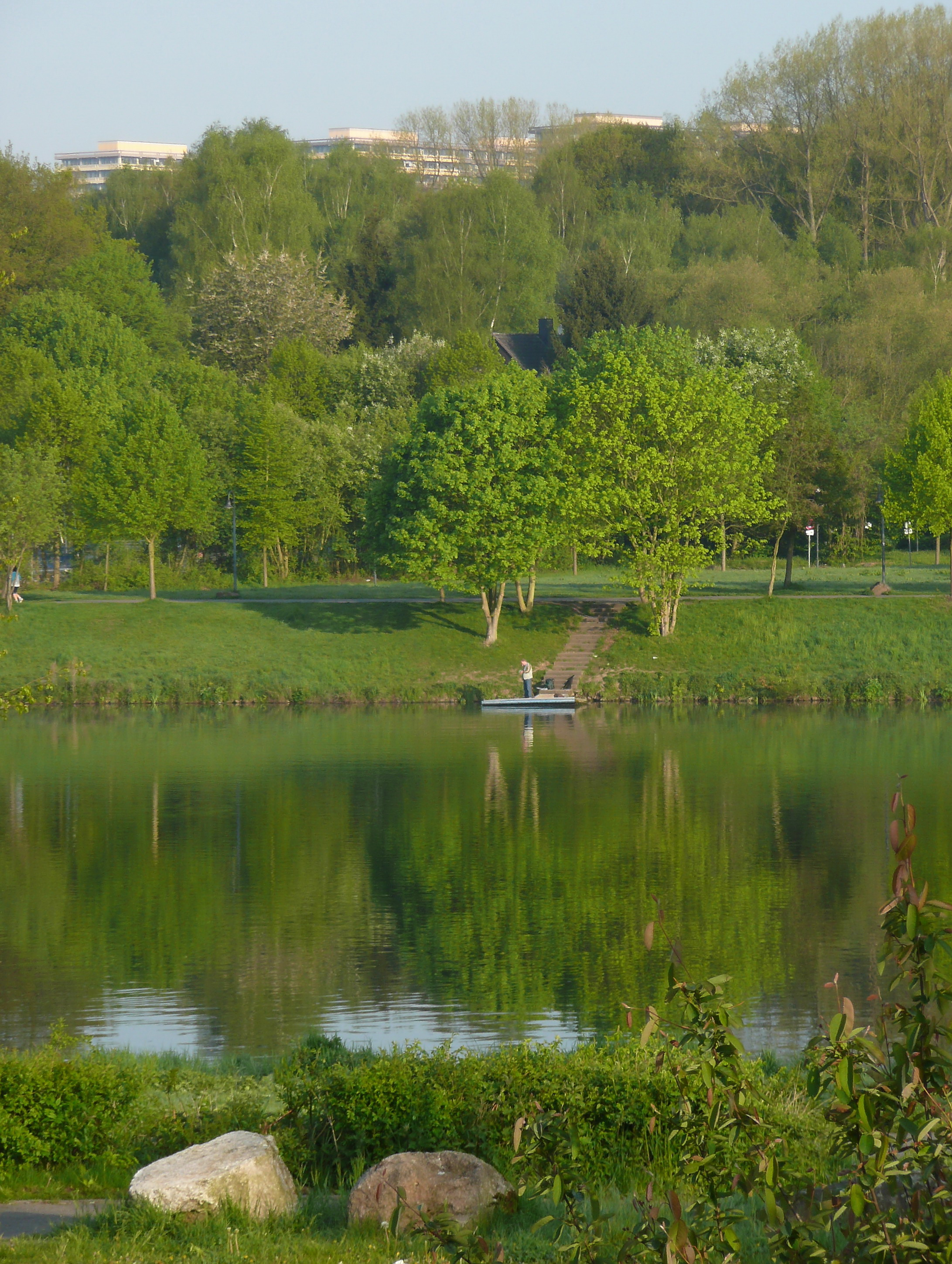 Kemnader See im Hintergrund am Rand eines Steilhangs die Ruhr-Universität Bochum